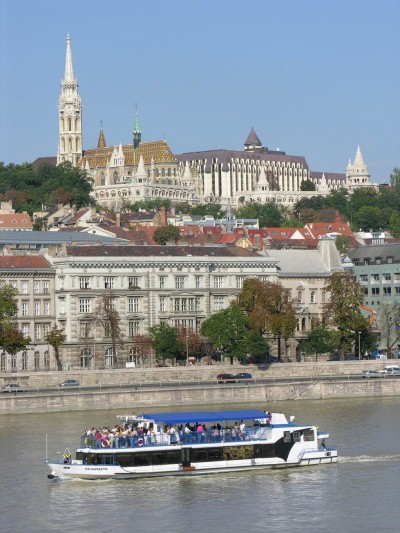 Halászbástya Budapesten - Fisher Bastion in Budapest